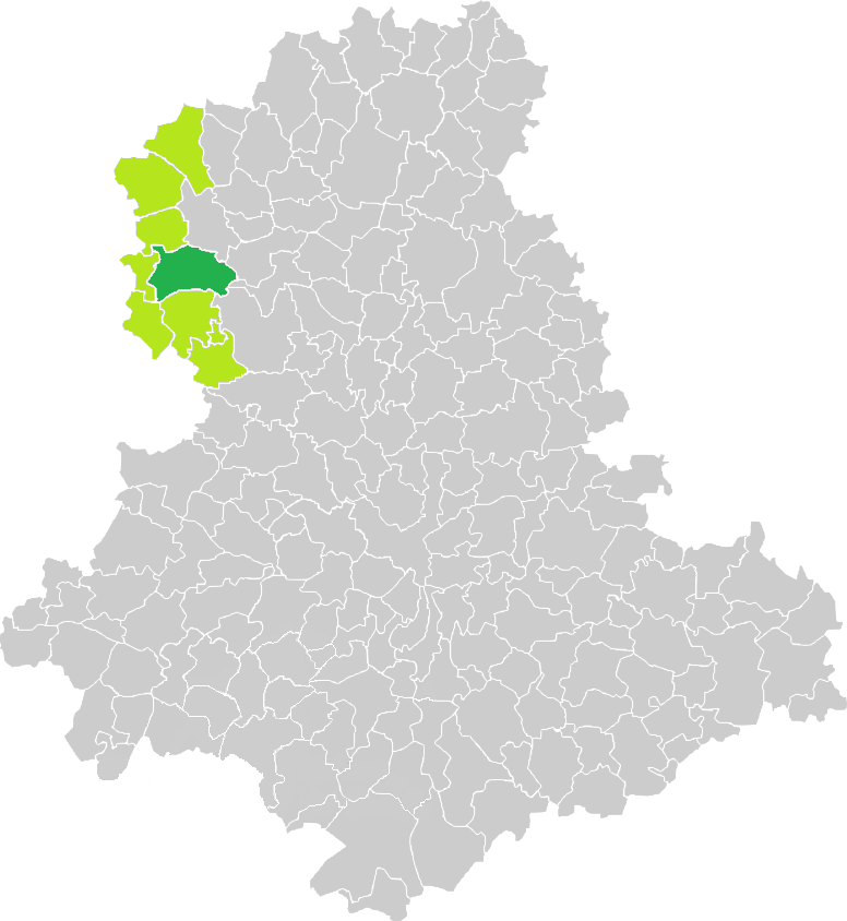 Carte de situation de la commune de Mézières-sur-Issoire (en vert foncé) dans le votre Canton (en vert clair) sur une carte des communes de la Haute-Vienne